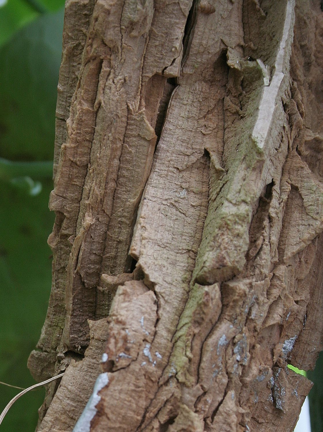 Aristolochia gigantea Conservatoire botanique national de Brest, France, juin 2007